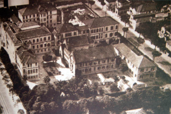 Vista aérea do complexo hospitalar Santa Catarina em 1934. Parte dessas instalações foi demolida em 1949 e substituída por edificações mais modernas em reformas subsequentes ocorridas entre as décadas de 1950 e 1980.